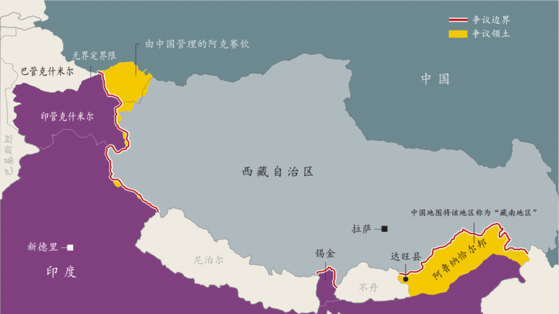 中国与印度边界地图。图片来自VOA中文网，右下角水印显示，作者为中央情报局。